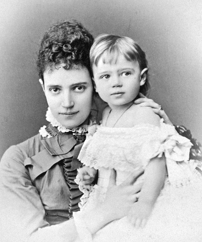 ロシアのマリア皇太子妃と彼女の長女クセニア